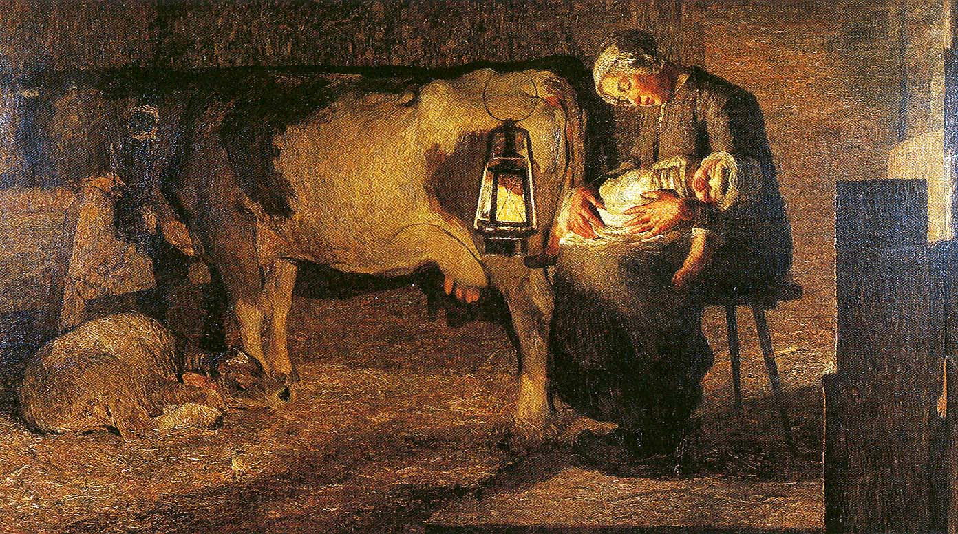 Die beiden Müttertitle QS:P1476,de:"Die beiden Mütter" label QS:Lde,"Die beiden Mütter"